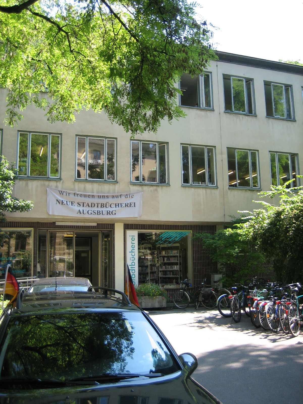 Stadtbücherei Augsburg an der Gutenbergstraße, Eingang